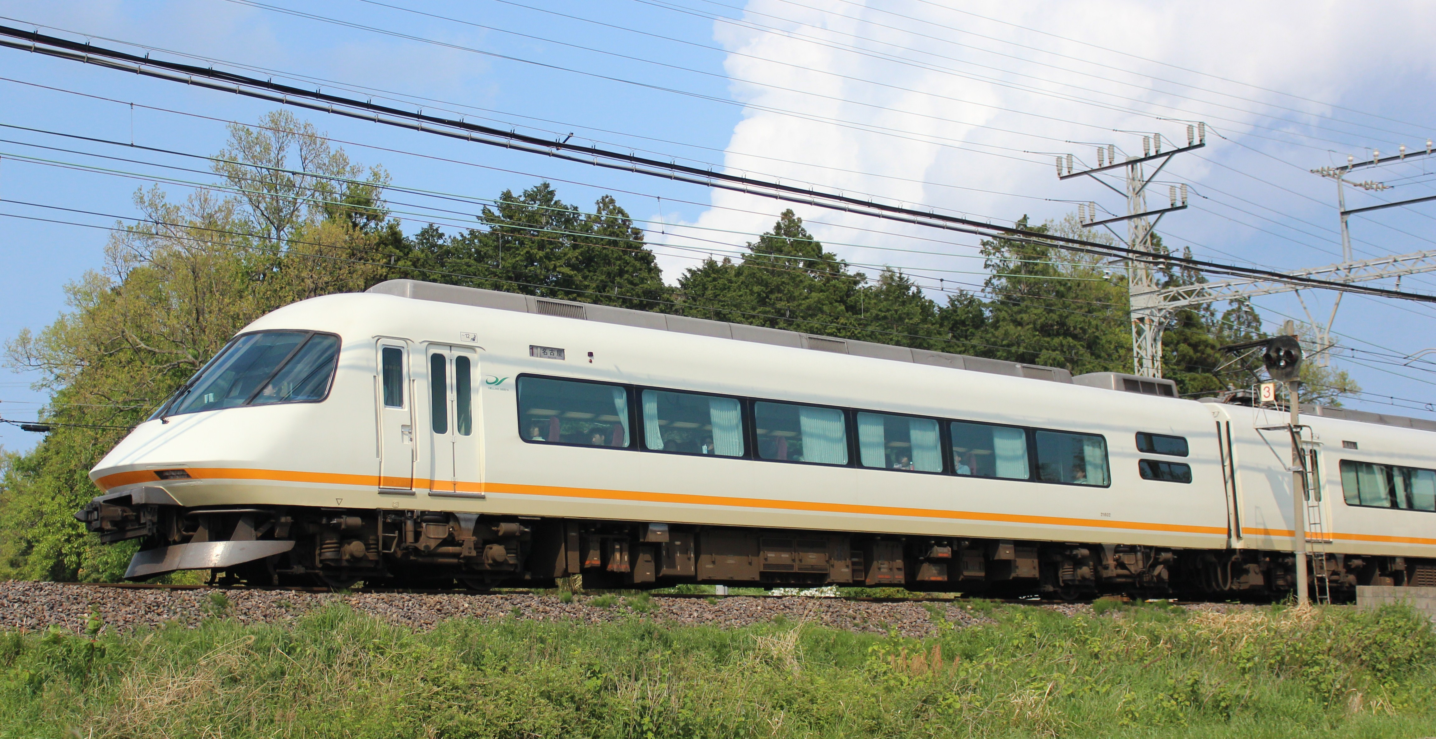 近鉄21000系更新車